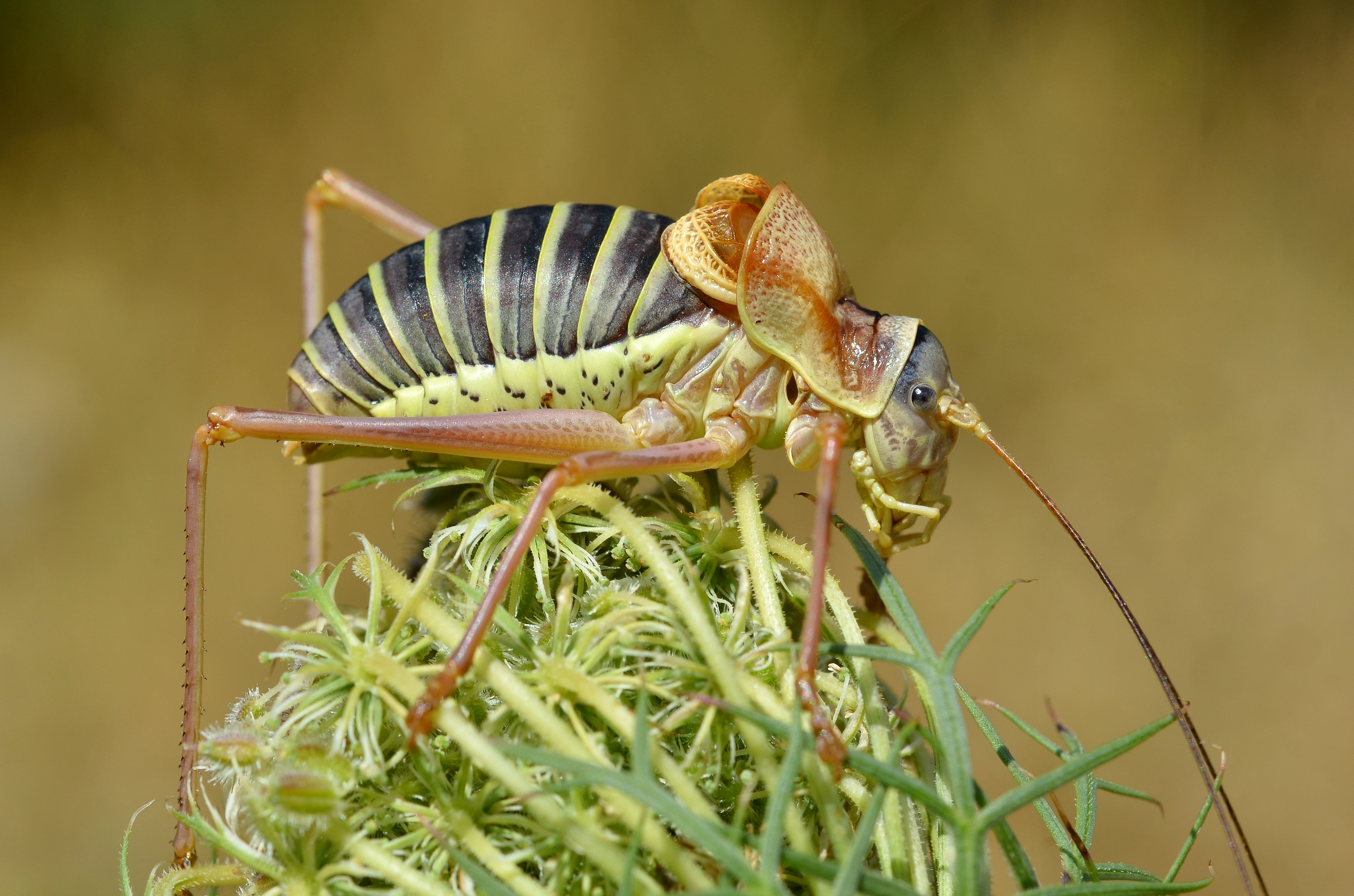 Ephipiger ephipiger